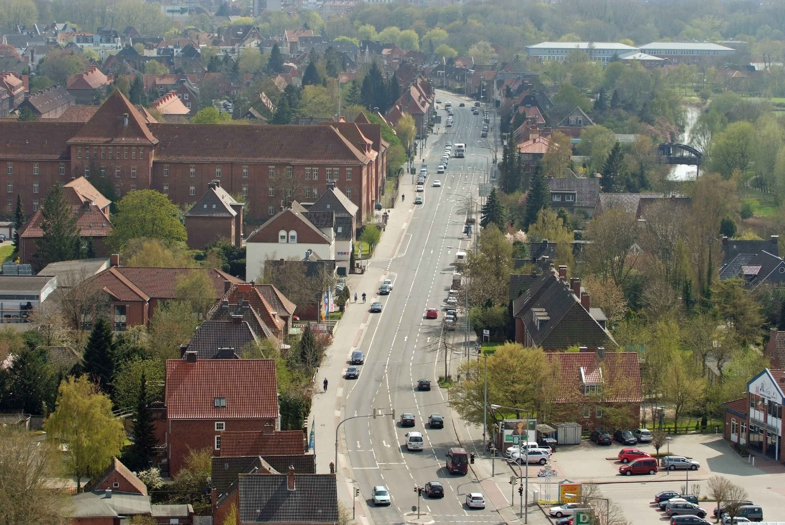 Auricher Straße (ehem Bundesstraße 70) in Emden